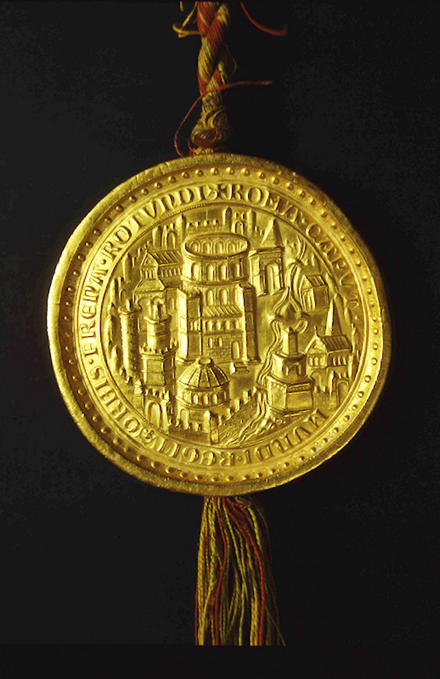 Bulle d'or de l'empereur Louis IV de Bavière